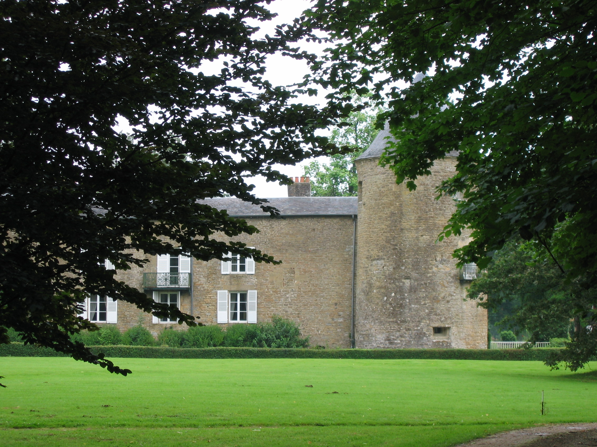 Château de Bogny à Murtin-et-Bogny, Ardennes (France)